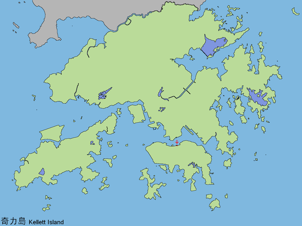 中文（香港）: 奇力島。